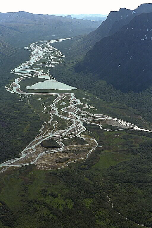 Rapadalen från Tielmaskaite, mot sydöst. Laponia Motiv: Sarek Nyckelord: Flygbilder, Riksintressen, Världsarv Kategori: Fjällbygd Rapadalen från Tielmaskaite, mot sydöst. Laponia.